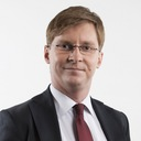 Juras Požėla 1982